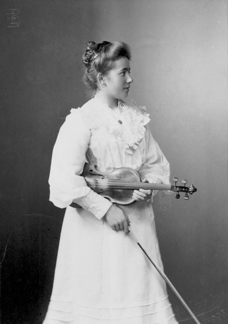 Portrait of Pálma von Pásztory